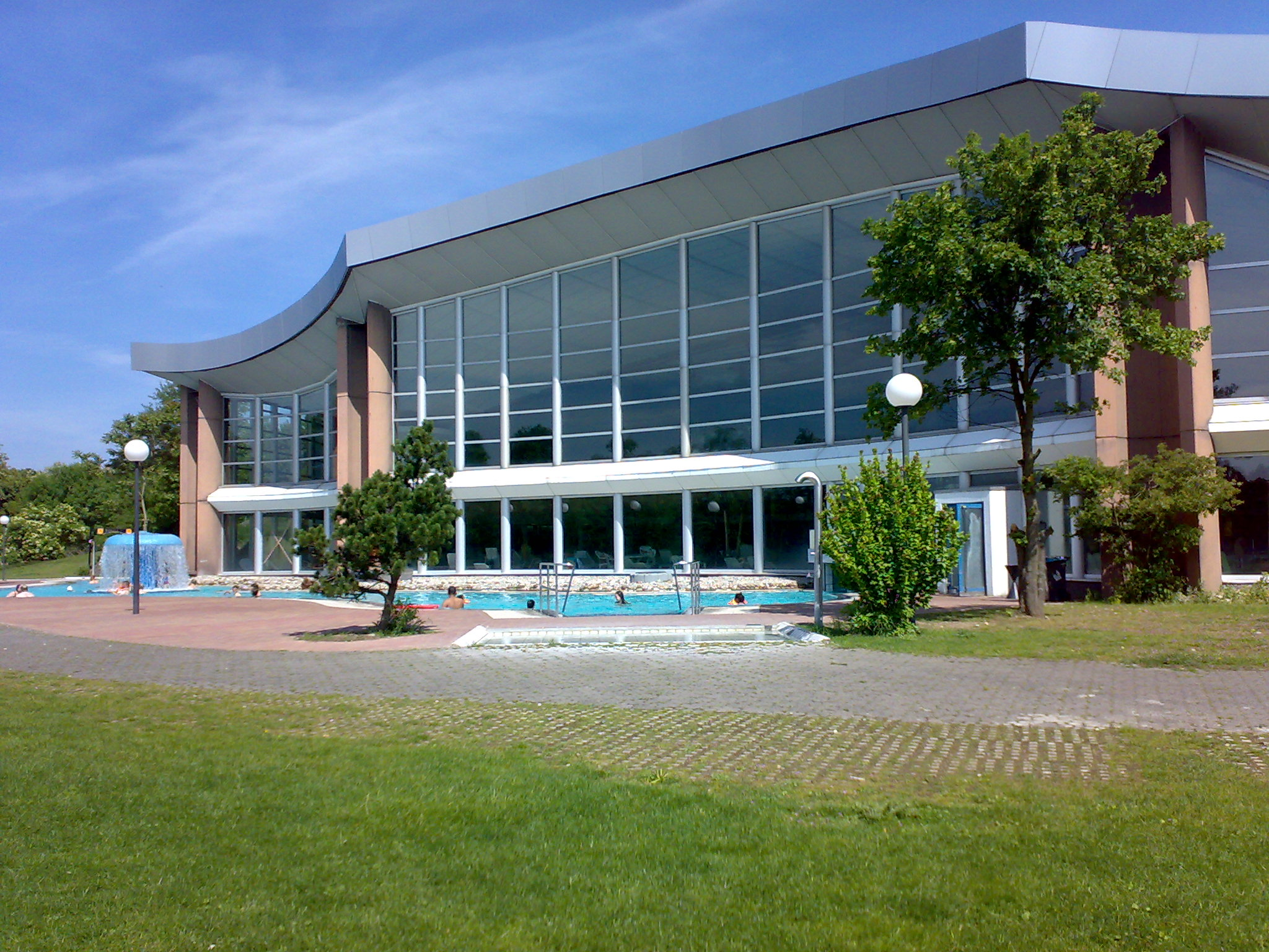 Außenbecken des Rebstockbades in Frankfurt am Main